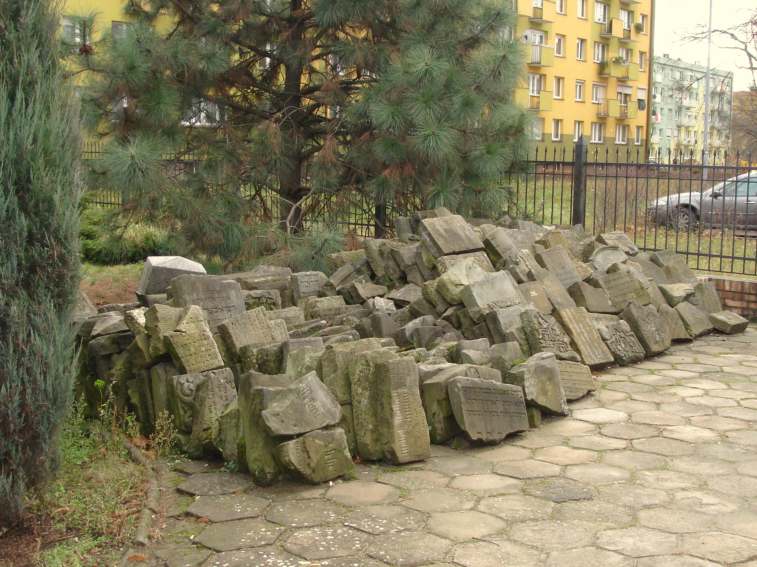 Fragmenty macew na dawnym cmentarzu żydwoskim w Lesznie